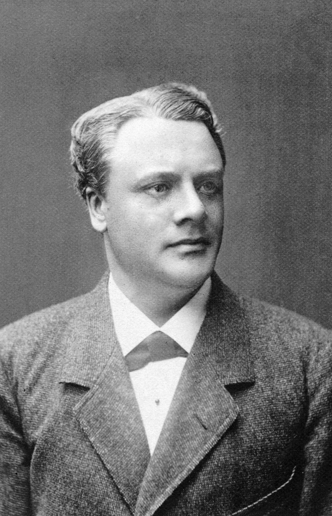 Richard Wagner, skådespelare vid Nya teatern 1880